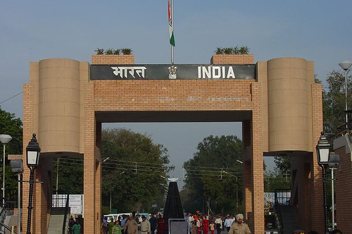 India gate at Wagah border point